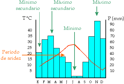 Esquema de interpretación de climogramas.